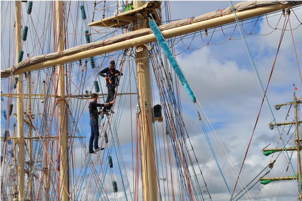 Climbing the rigging